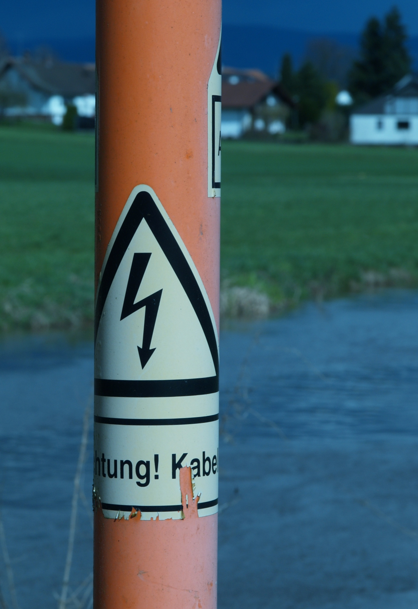 Details eines Leitungs-Markierungspfahls am Bogenbach bei Bärndorf